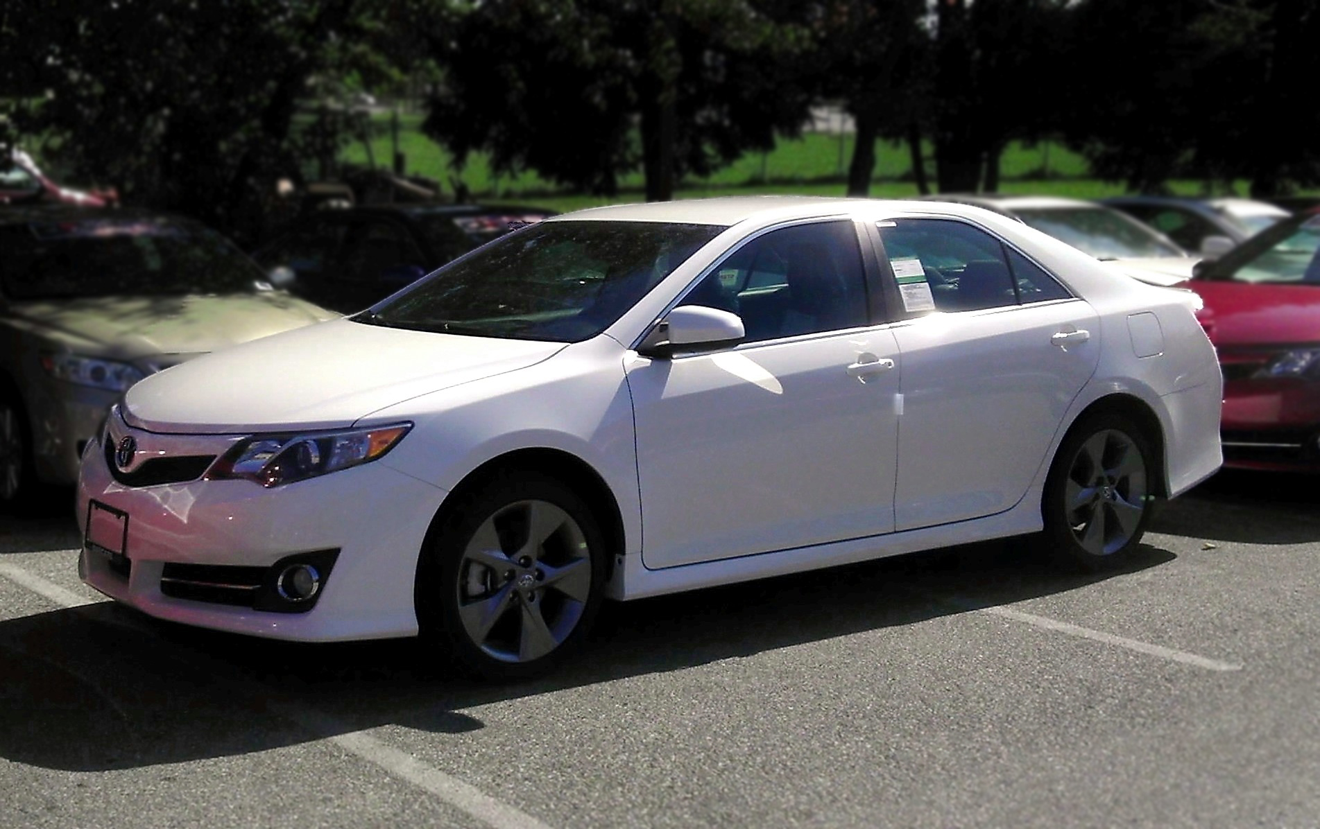 En Toyota Camry SE V6 (XV50) från 2012 i färgen Super White.